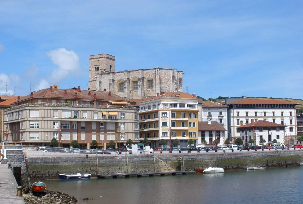 Zumaia (Gipuzkoa)